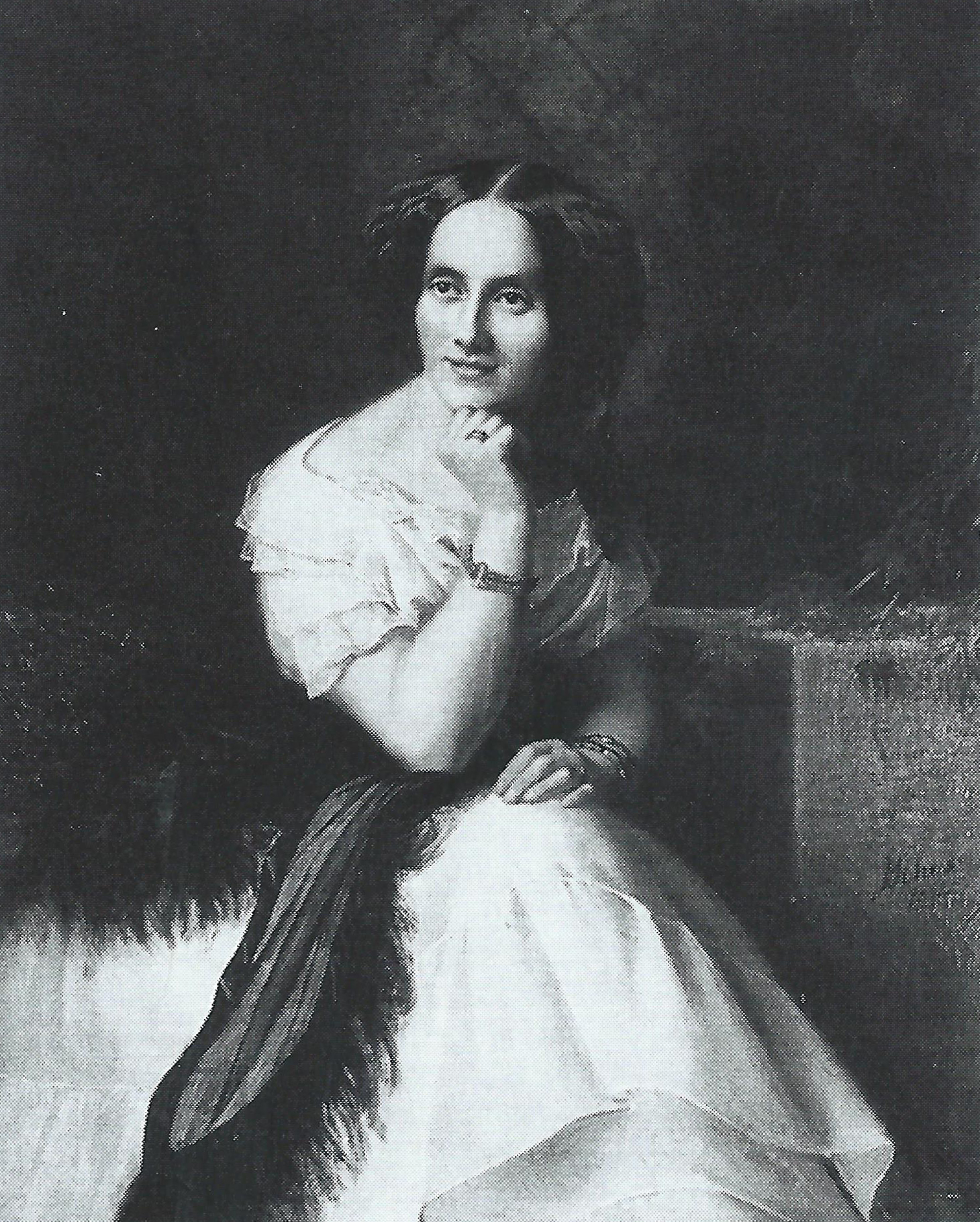 Josef Schex: Damenbildnis der Eleonore Charlotte Dorothea Böcking (* 1827), 1854